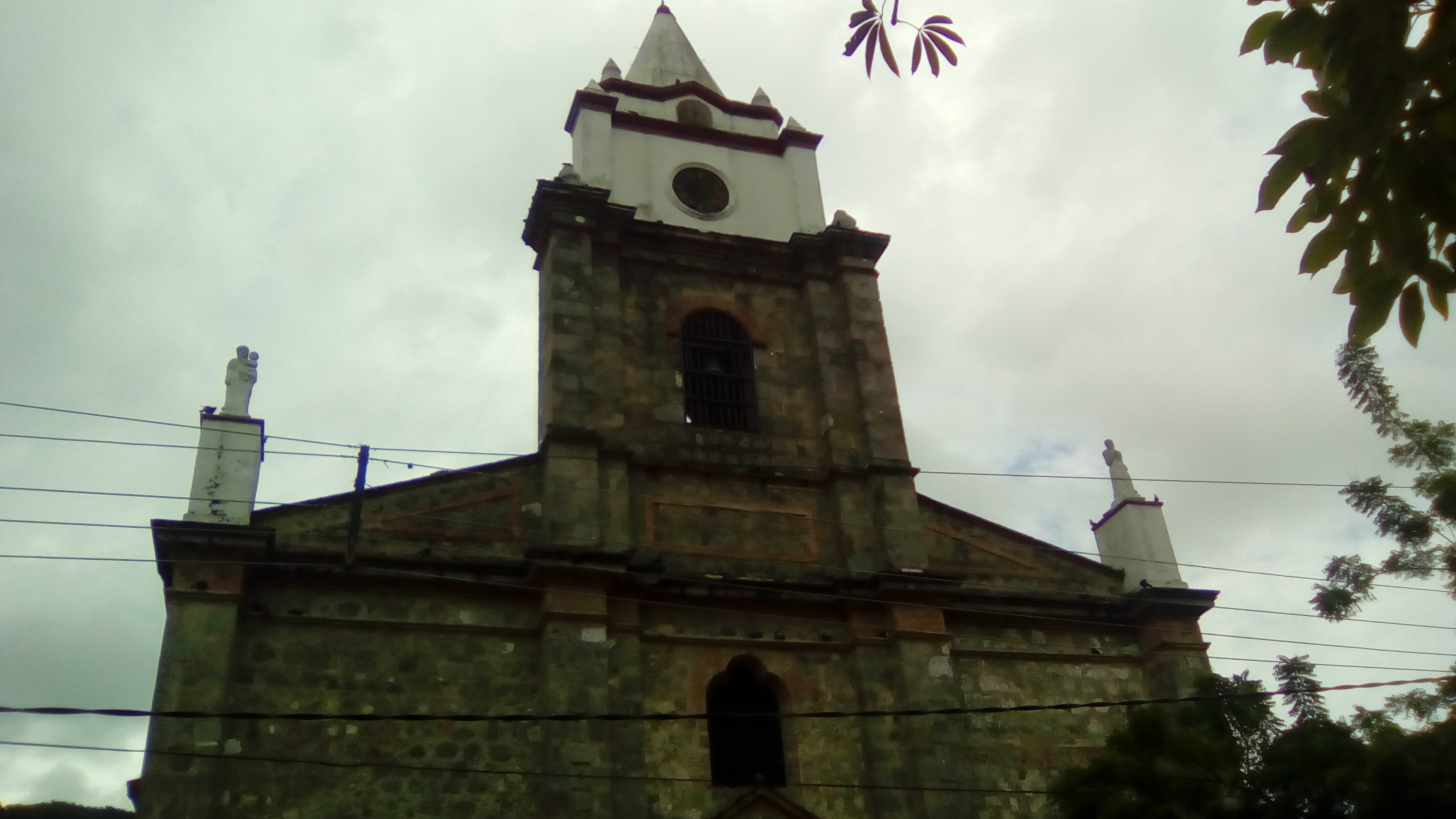 Iglesia Nuestra Señora del Rosario, Honda